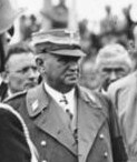 Scherl: Die Abreise der ausländischen Staatsmänner von München Der Chef der Ehrenkompanie der SS Standarte "Deutschland" meldet Ministerpräsident Chamberlain seine Formation. Rechts Reichsaussenminister v. Ribbentrop, Mitte Reichsstatthalter Ritter von Epp, links der bayerische Ministerpräsident Siebert. 30.9.38, 12911-38